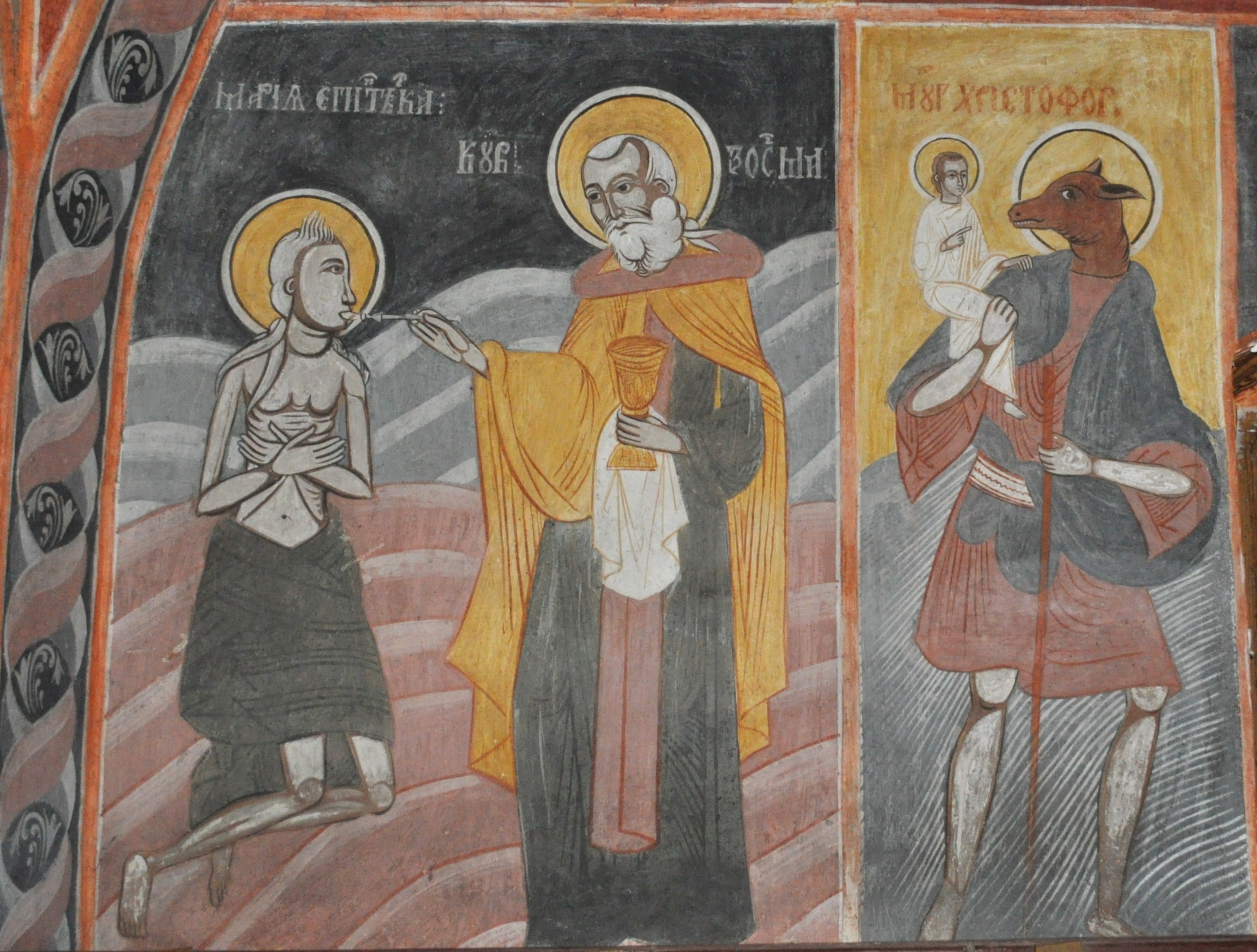 Biserica "Naşterea Domnului" , sat SĂRATA; comuna PORUMBACU DE JOS